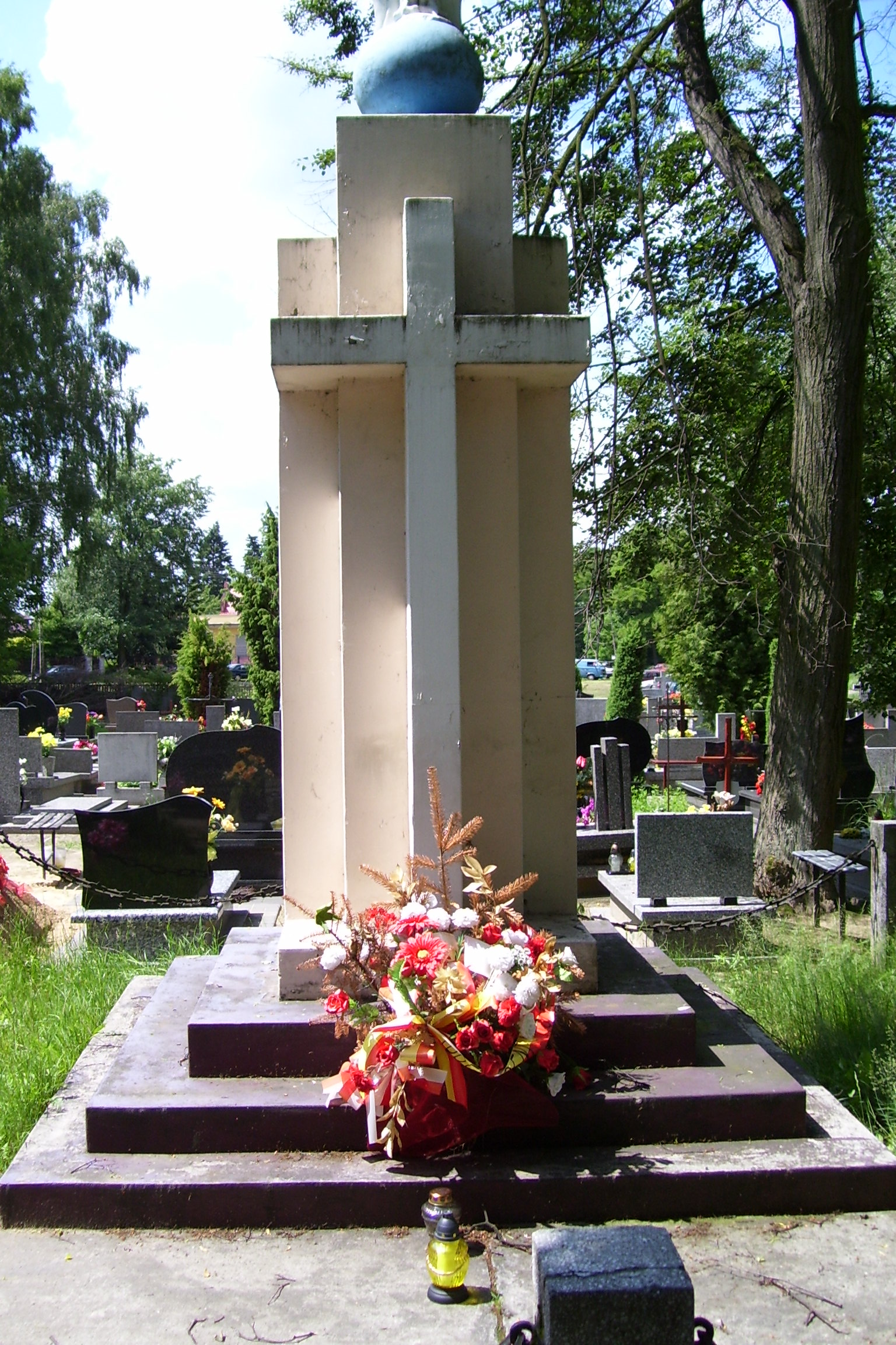 Pomnik na kwaterze uczestników bitwy pod Dobrą na miejscowym cmentarzu